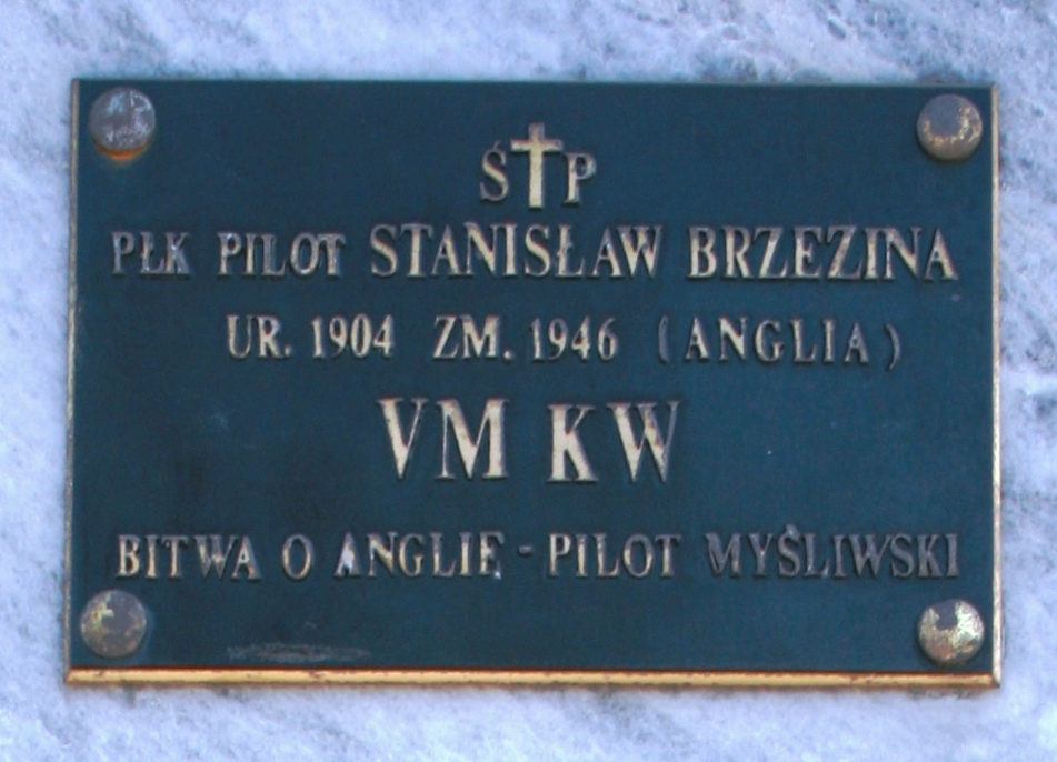 Kwatera I Samodzielnej Brygady Spadochronowej na Powązkach Wojskowych w Warszawie. Uhonorowany płk. pil. Stanisław Brzezina